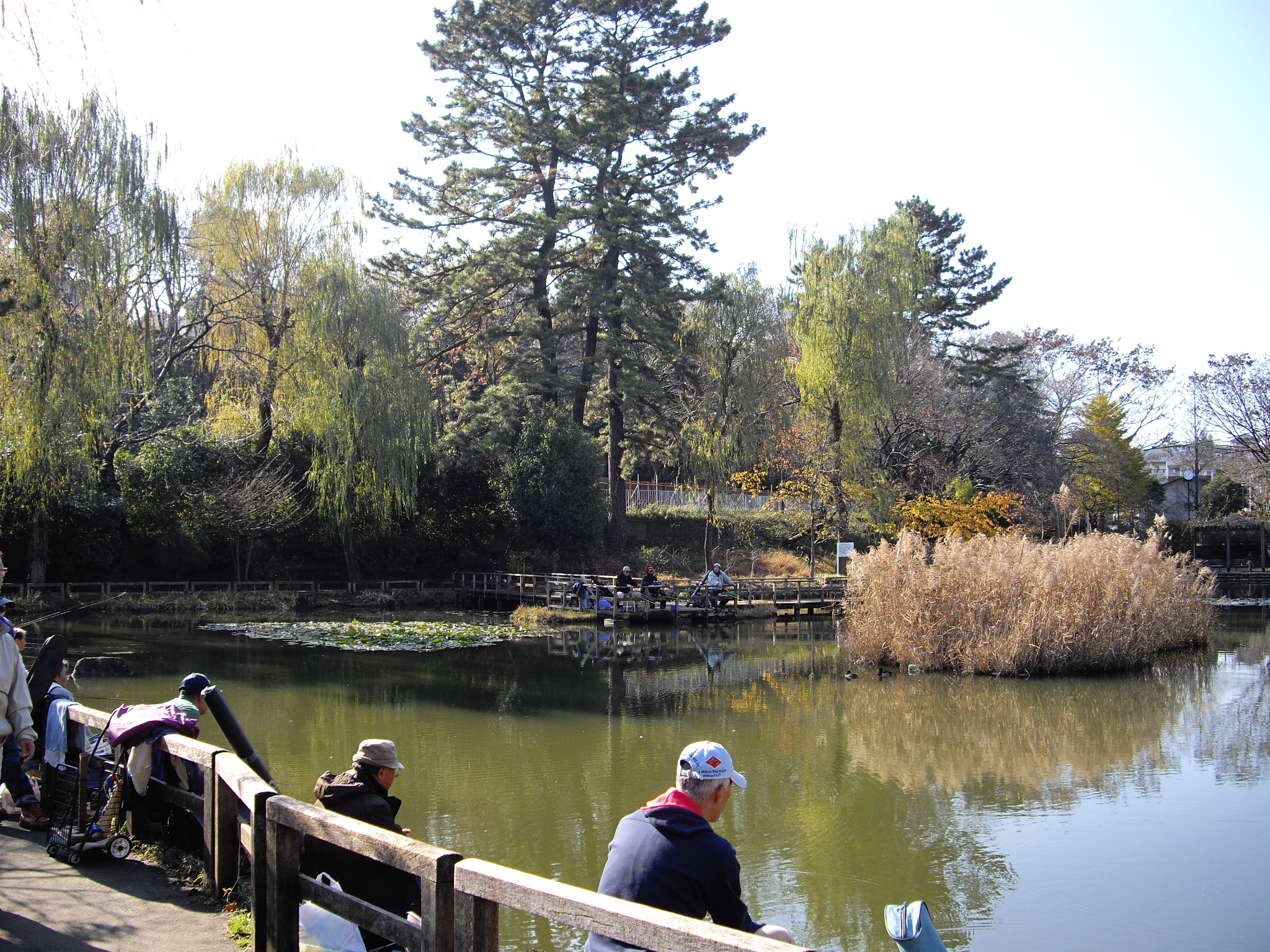 白幡池公園